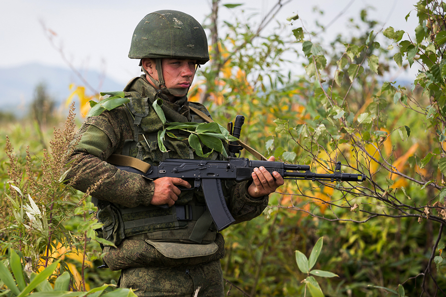 СКШУ «Восток-2014». День четвертый: действия мотострелкового подразделения в наступлении (о. Сахалин).